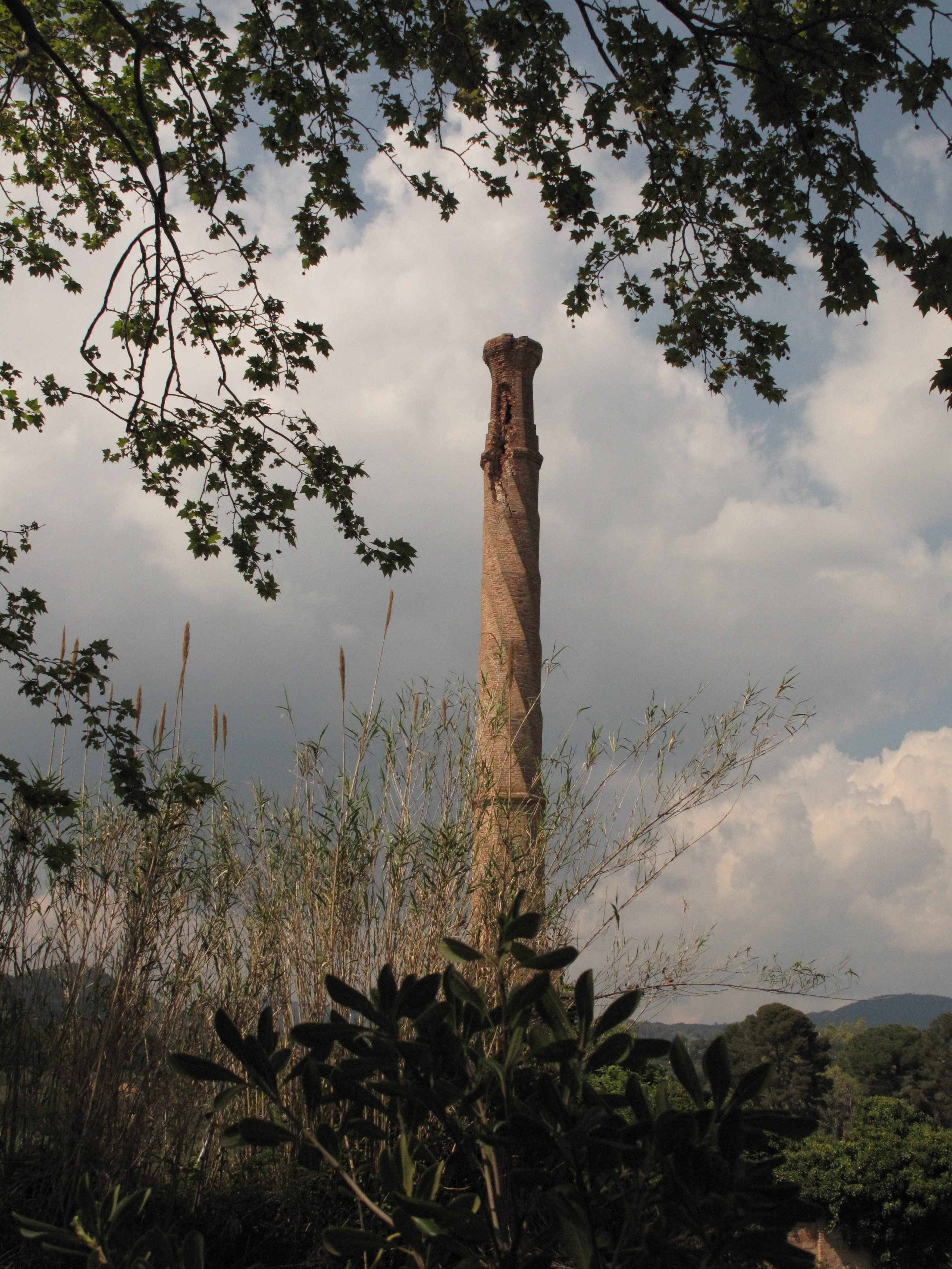 Fumera del Molí de la Vila (Reus)